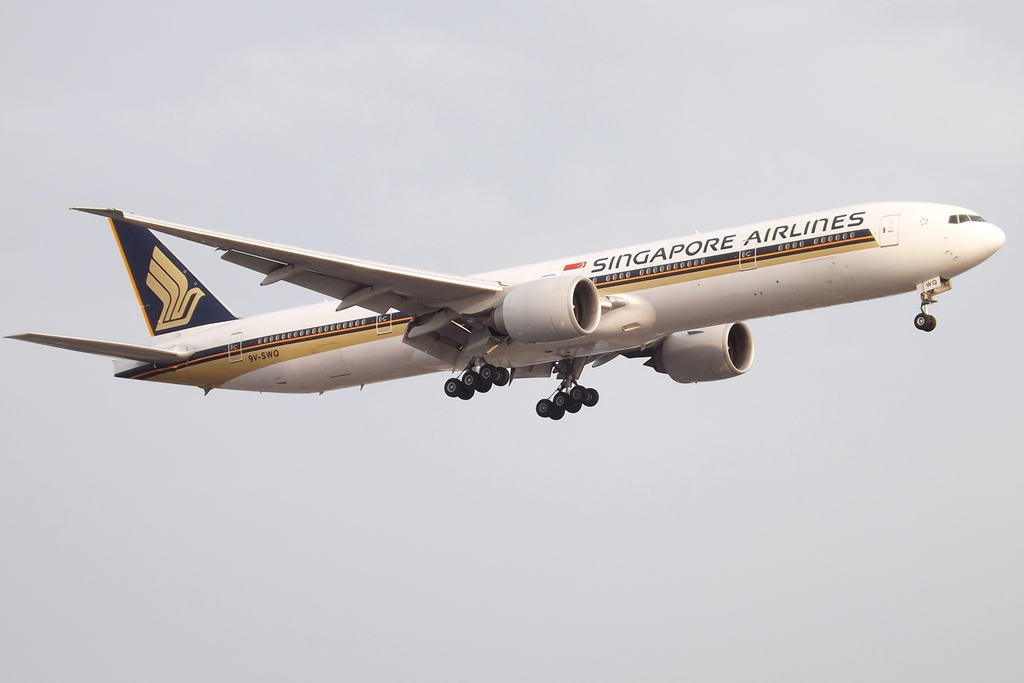 9V-SWQ Boeing 777 Singapore